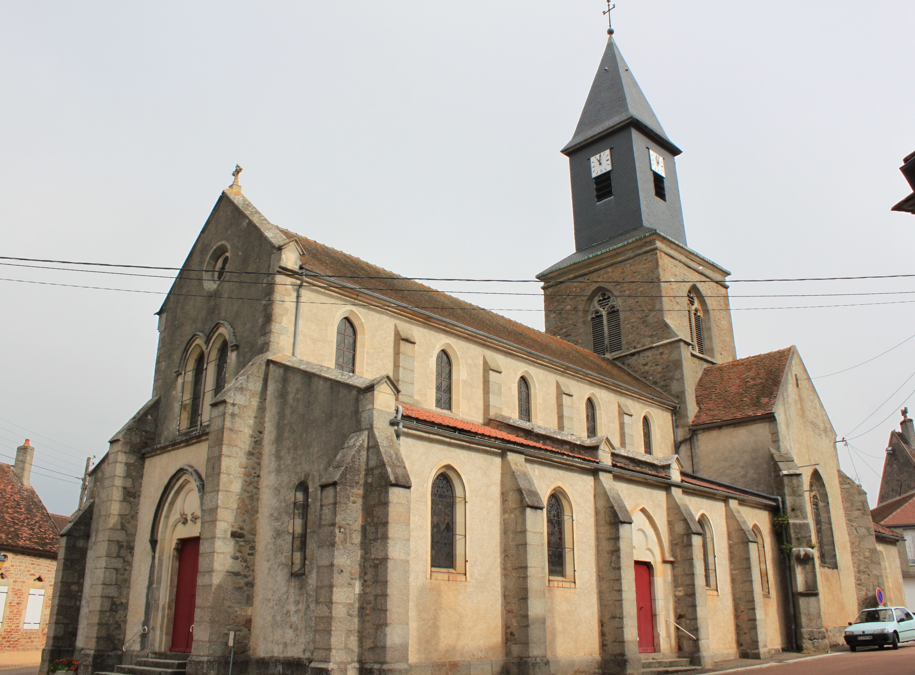 Rouvray, Côte-d'Or, Bourgogne, France